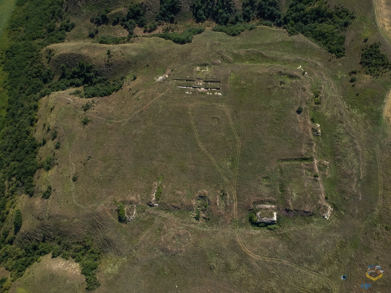 Cetatea Sacidava 02